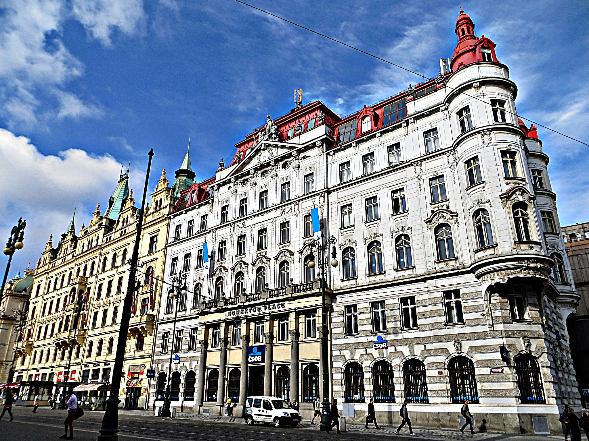 Konektor Place